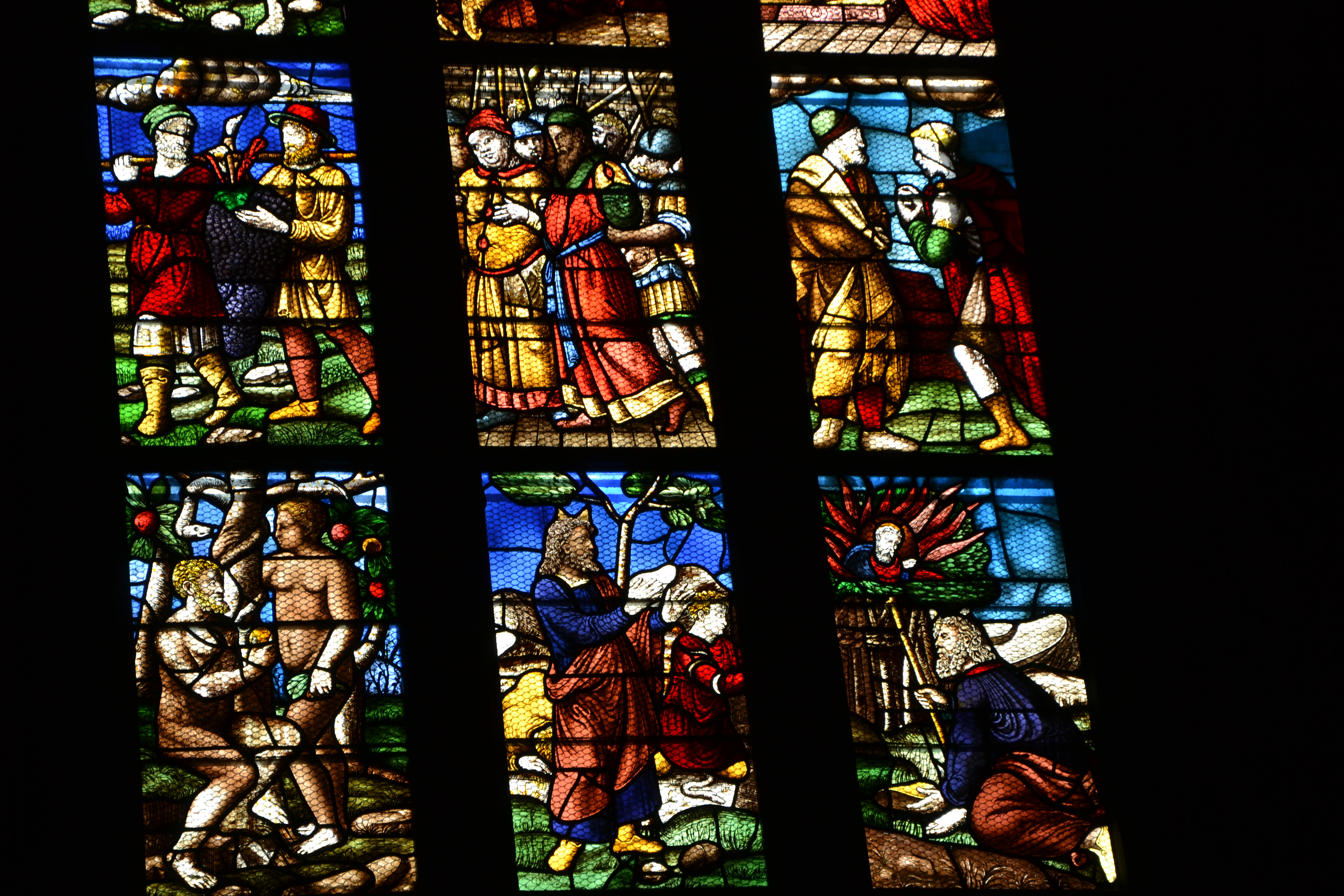 Milano, Duomo, Vetrata del Vecchio Testamento, navata destra, XV secolo